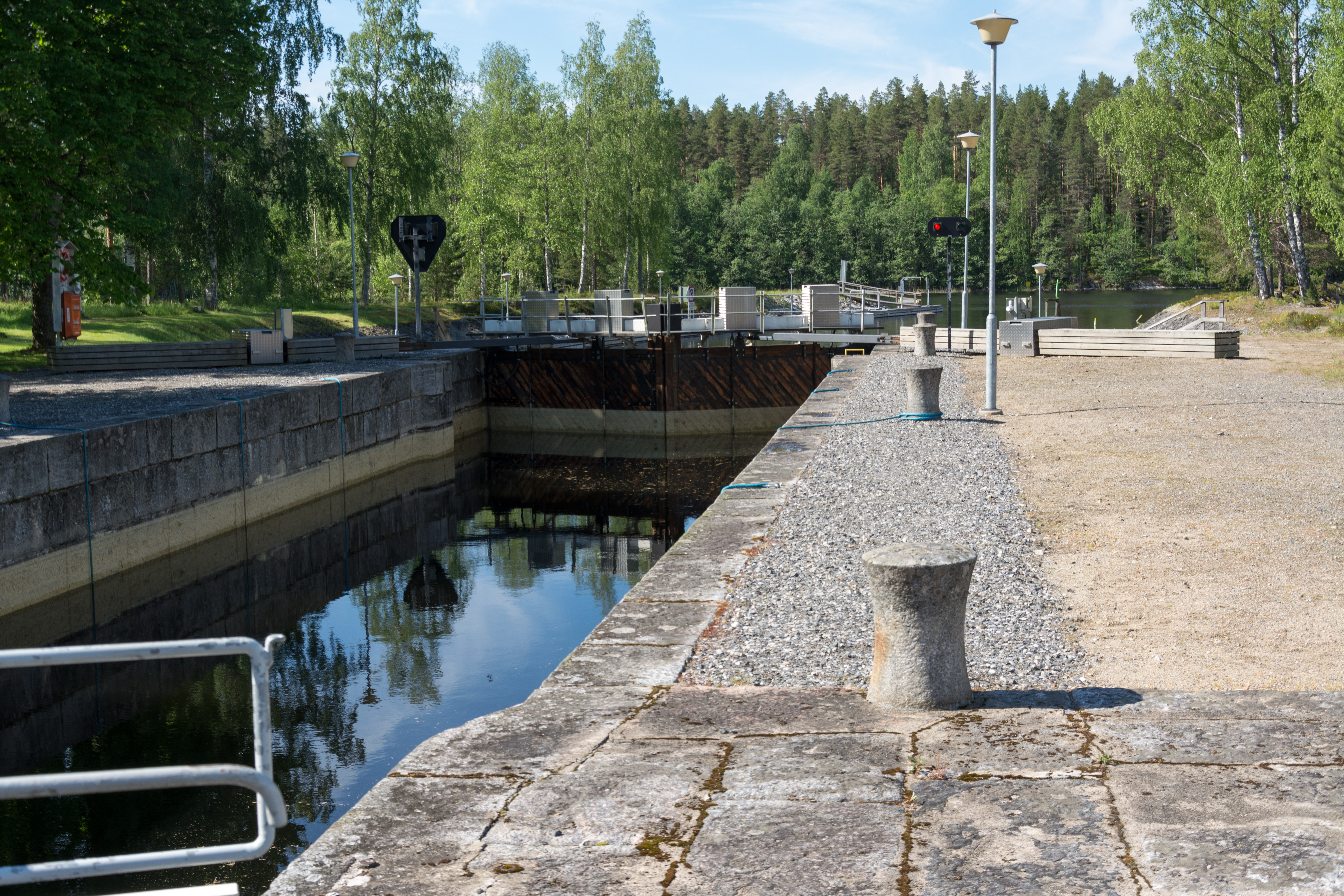 Pilpan kanava